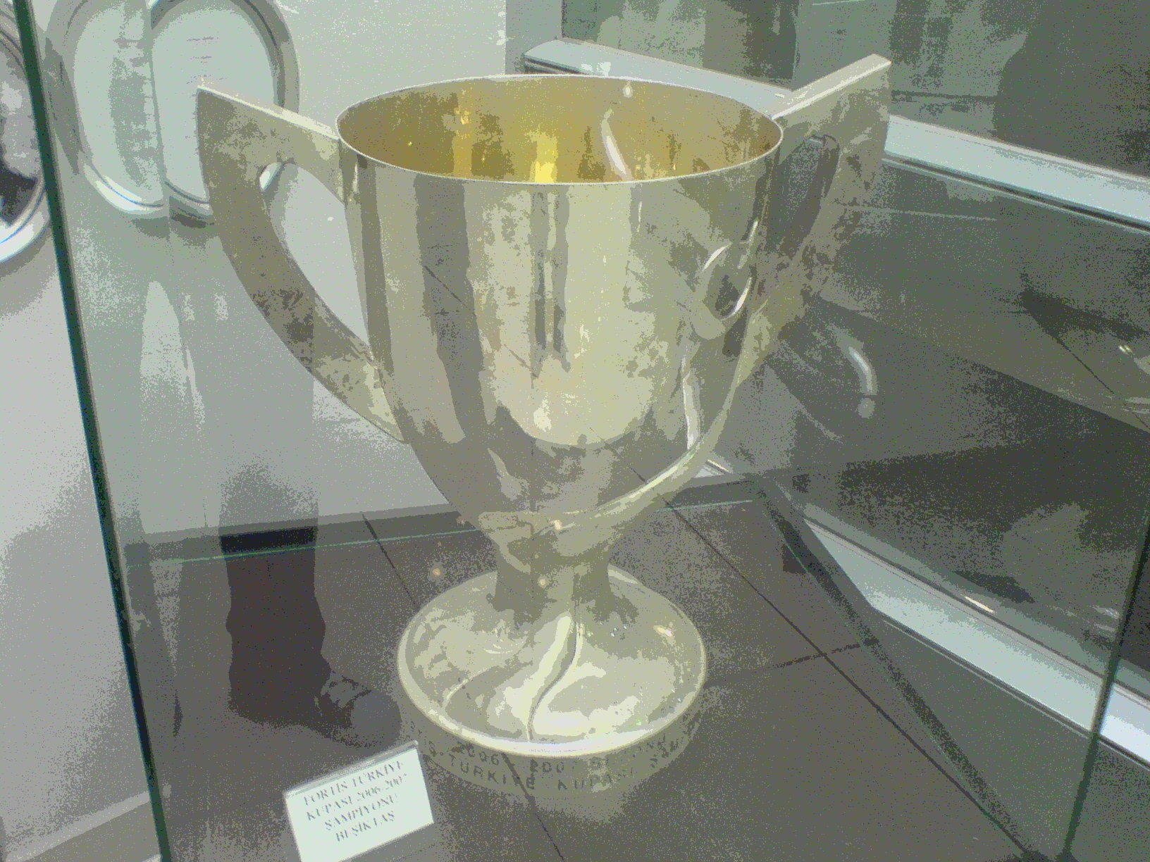 Fortis Türkiye Kupası'nın yakından görünümü.